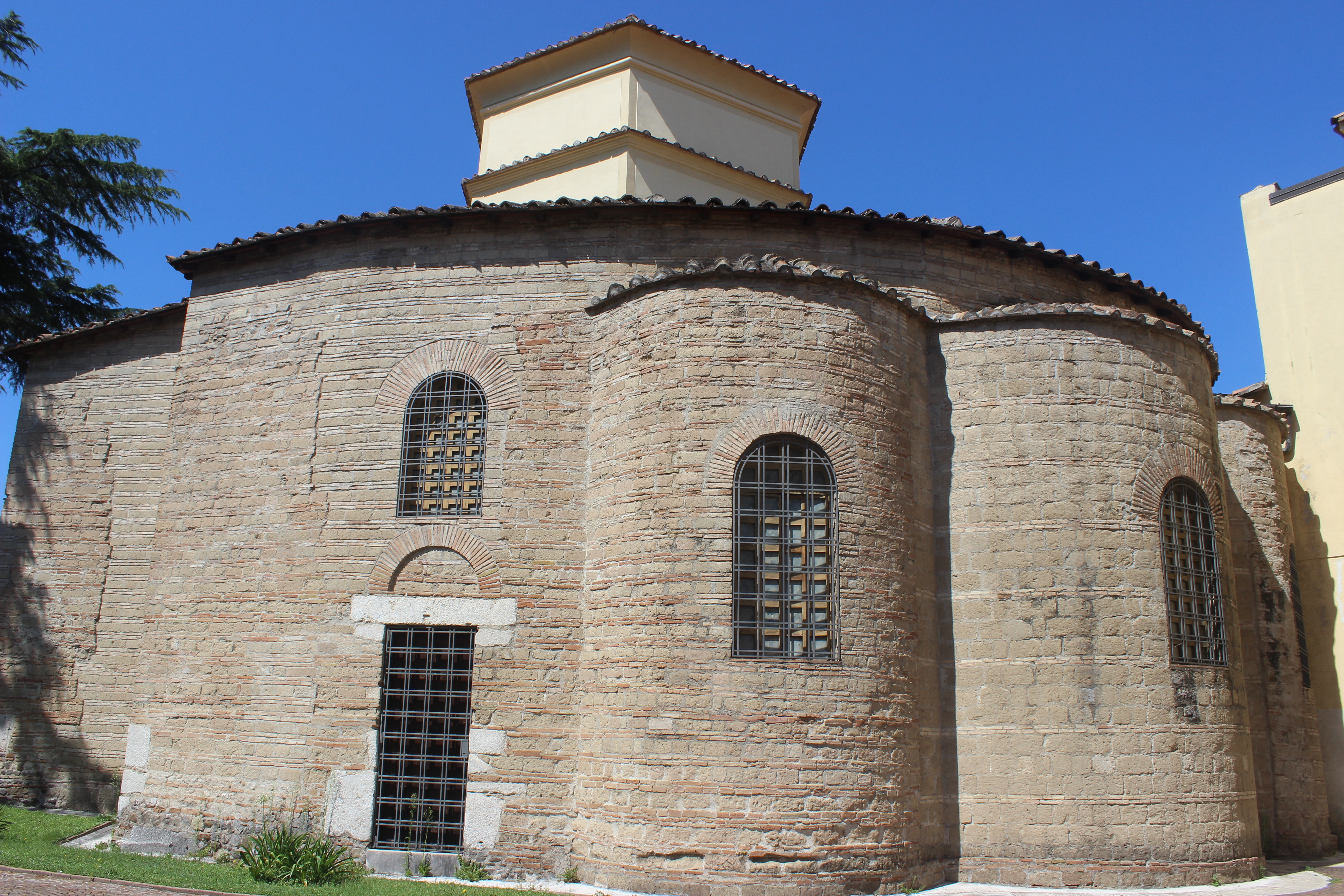 Benevento. Santa Sofía. Exterior.